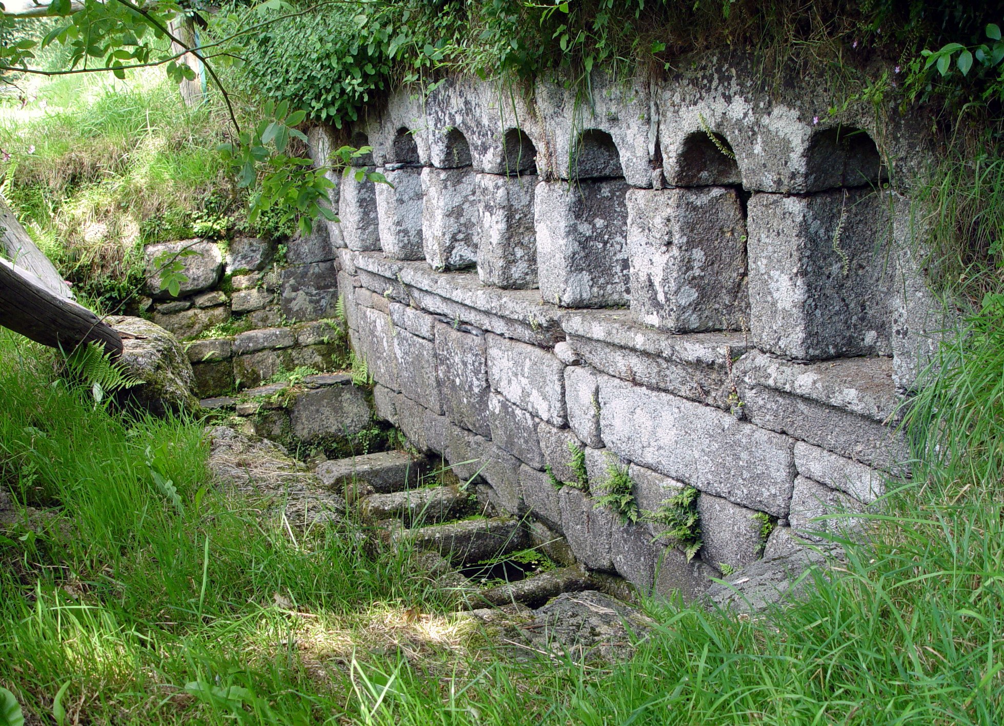 Bulat-Pestivien (Bretagne, Côtes-d'Armor) Fontaine des Sept-Saints (1683) Elle était autrefois ornée de ses sept statues représentant les premiers évêques de Bretagne, fondateurs des évêchés : les saints POL (St Pol de Léon), TUGDUAL (Tréguier), BRIEUC, MALO, SAMSON (Dol), PATERNE (Vannes), et CORENTIN (Quimper). .